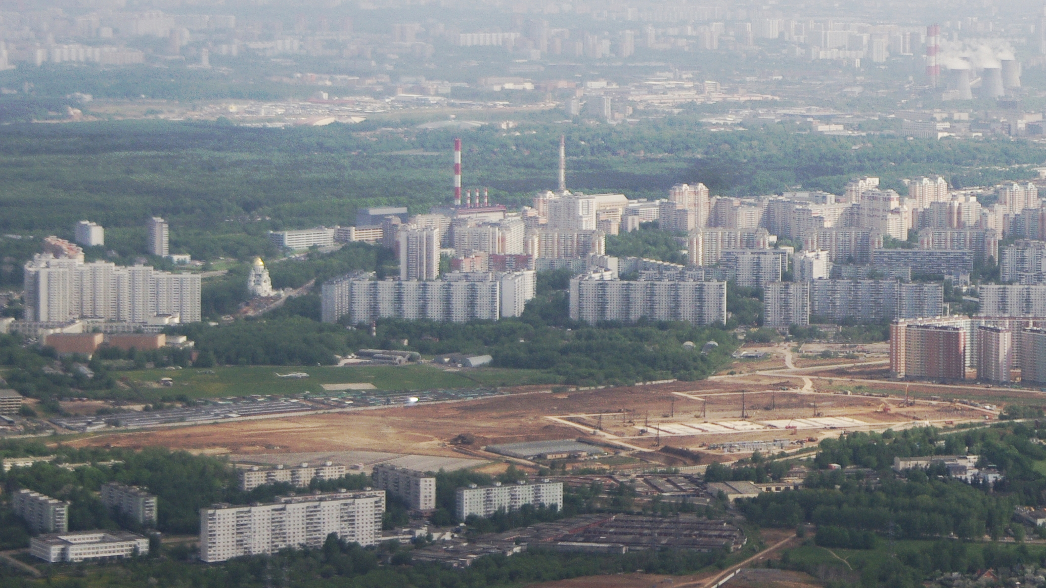 Вид из самолёта ATR-72 по маршруту Внуково - Стригино